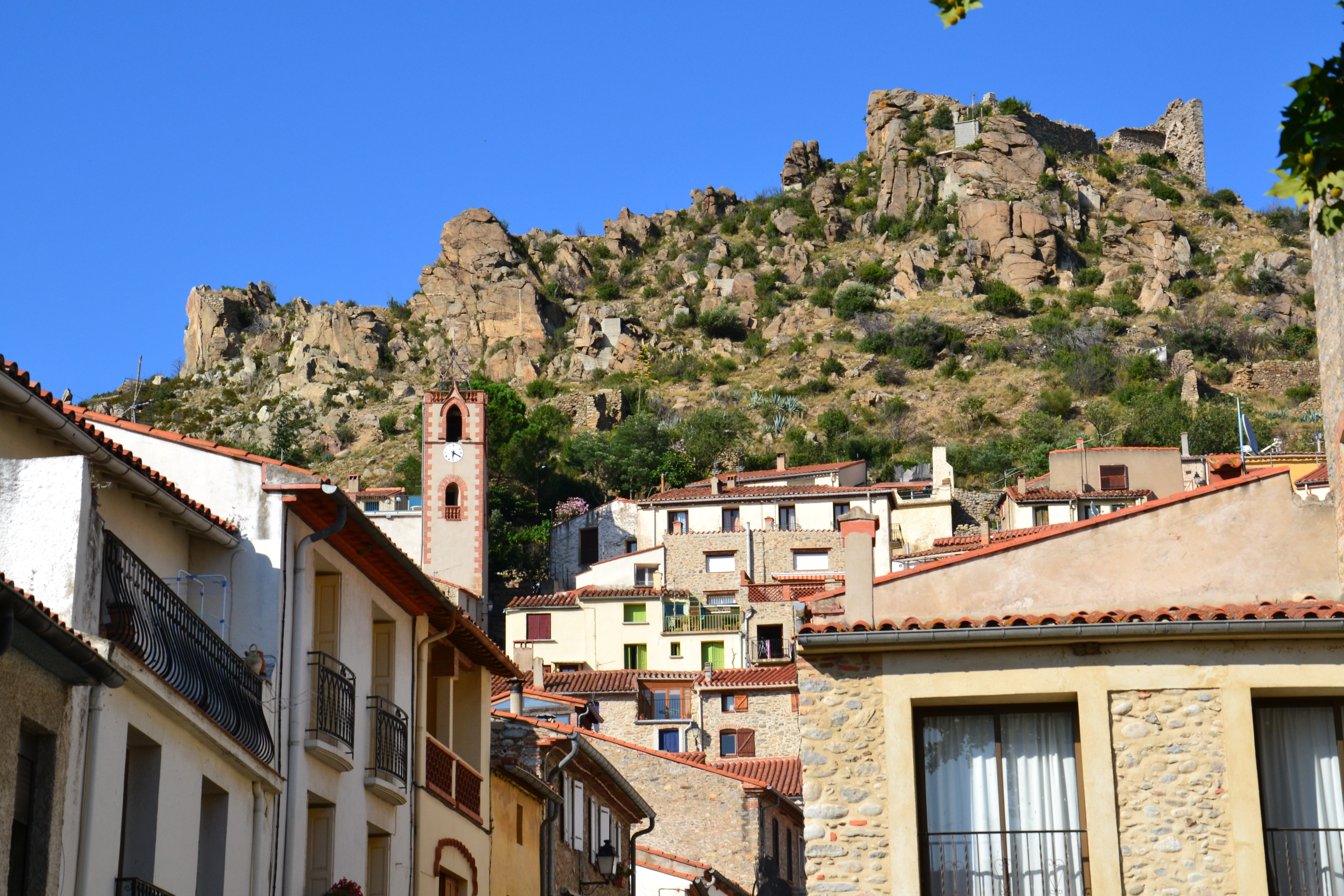 Vue du village de Rodès (Pyrénées-Orientales, France)